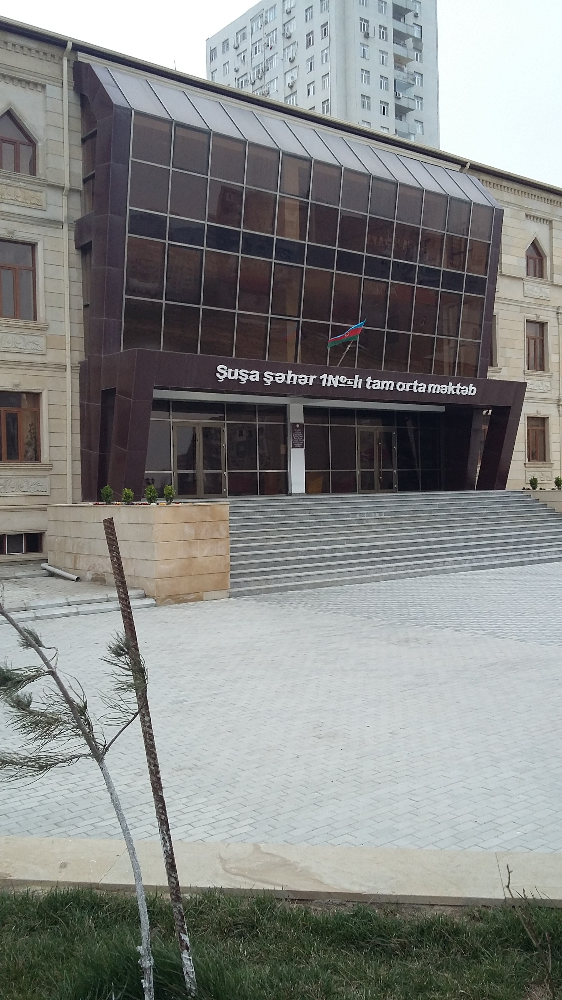 Yeni Yasamalda yerləşən Şuşa şəhər 1 nömrəli tam orta məktəbi